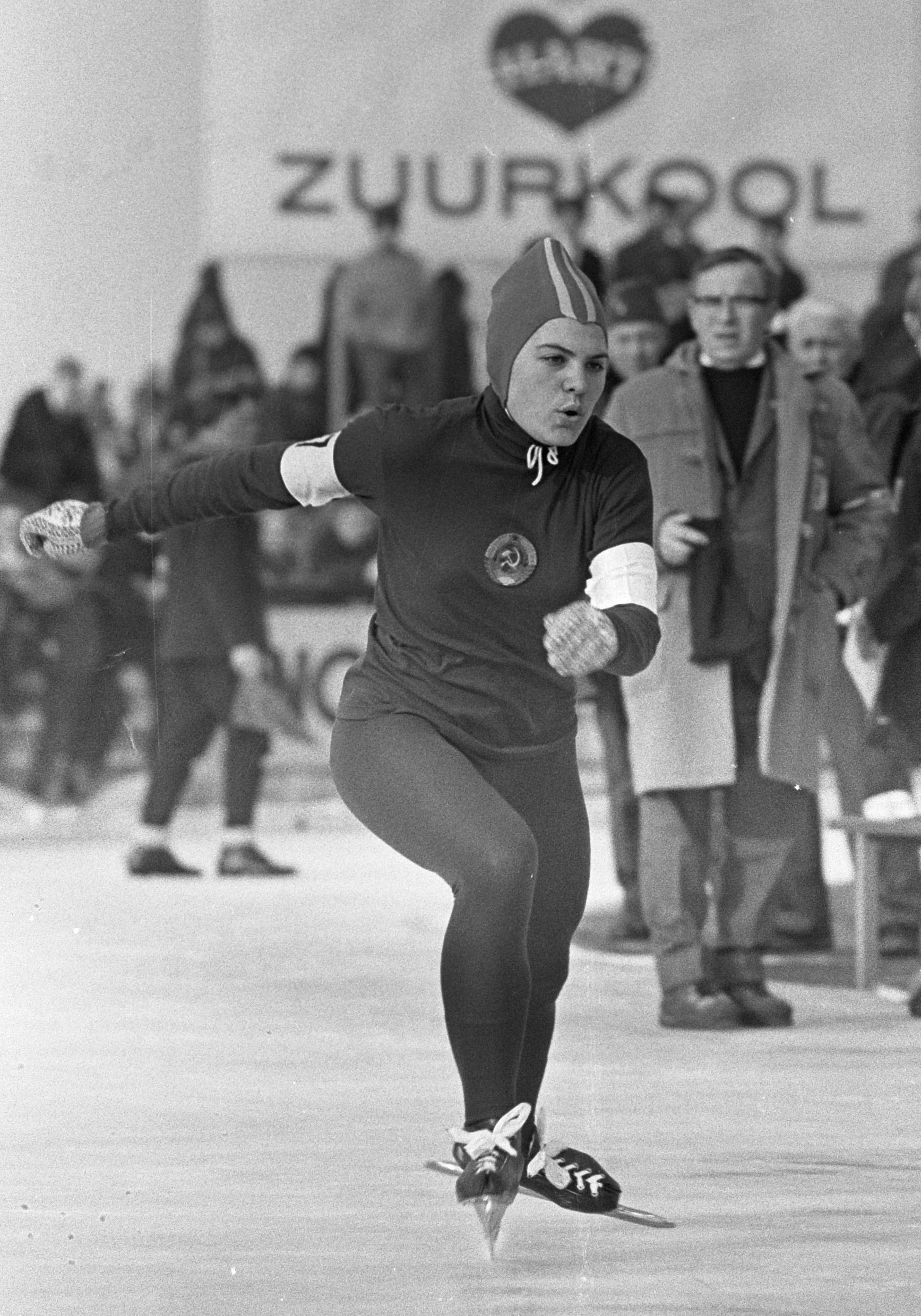 [Wereldkampioenschap schaatsen allround vrouwen], Anna Sablina